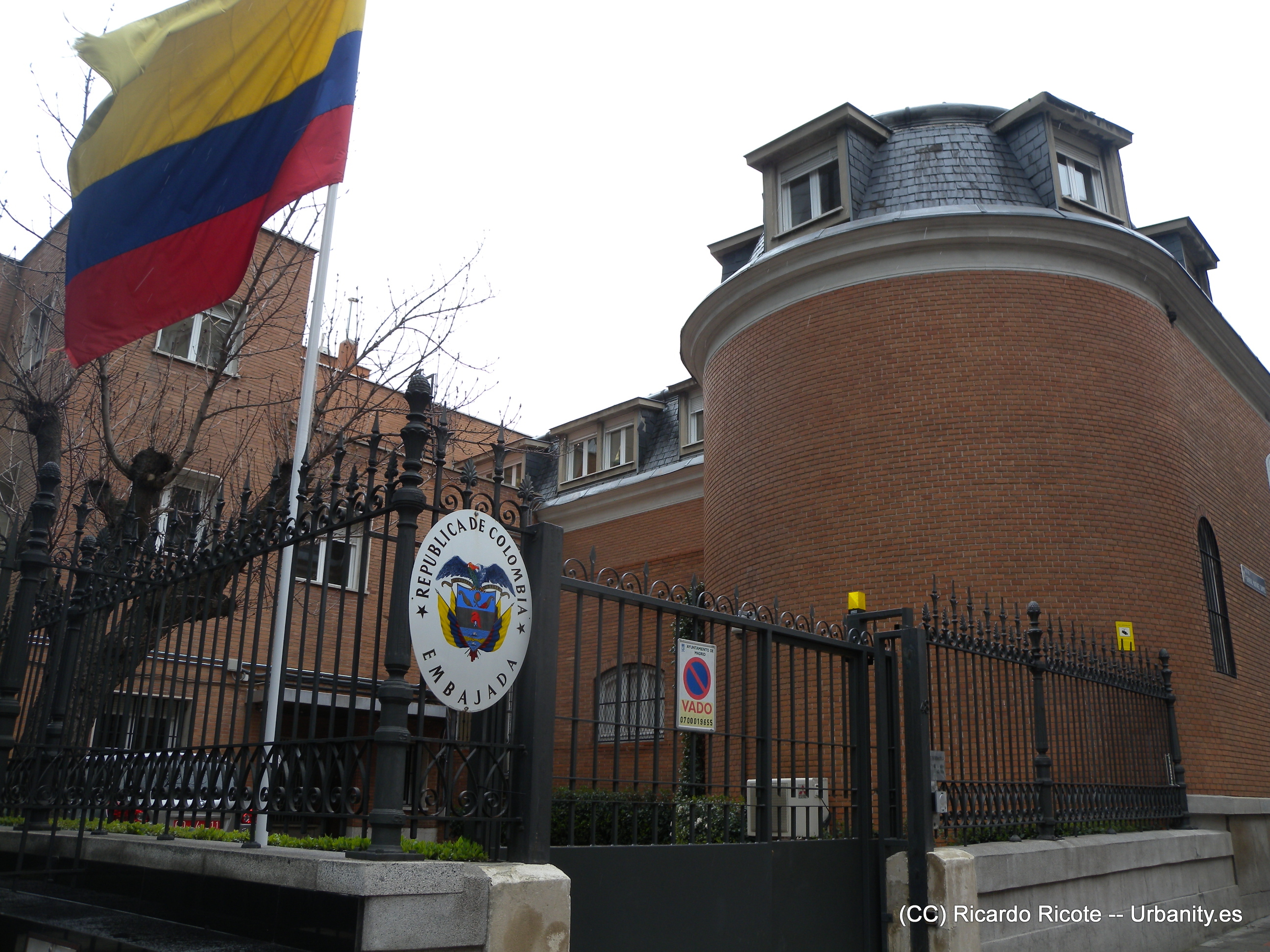 Embajada de Colombia en Madrid